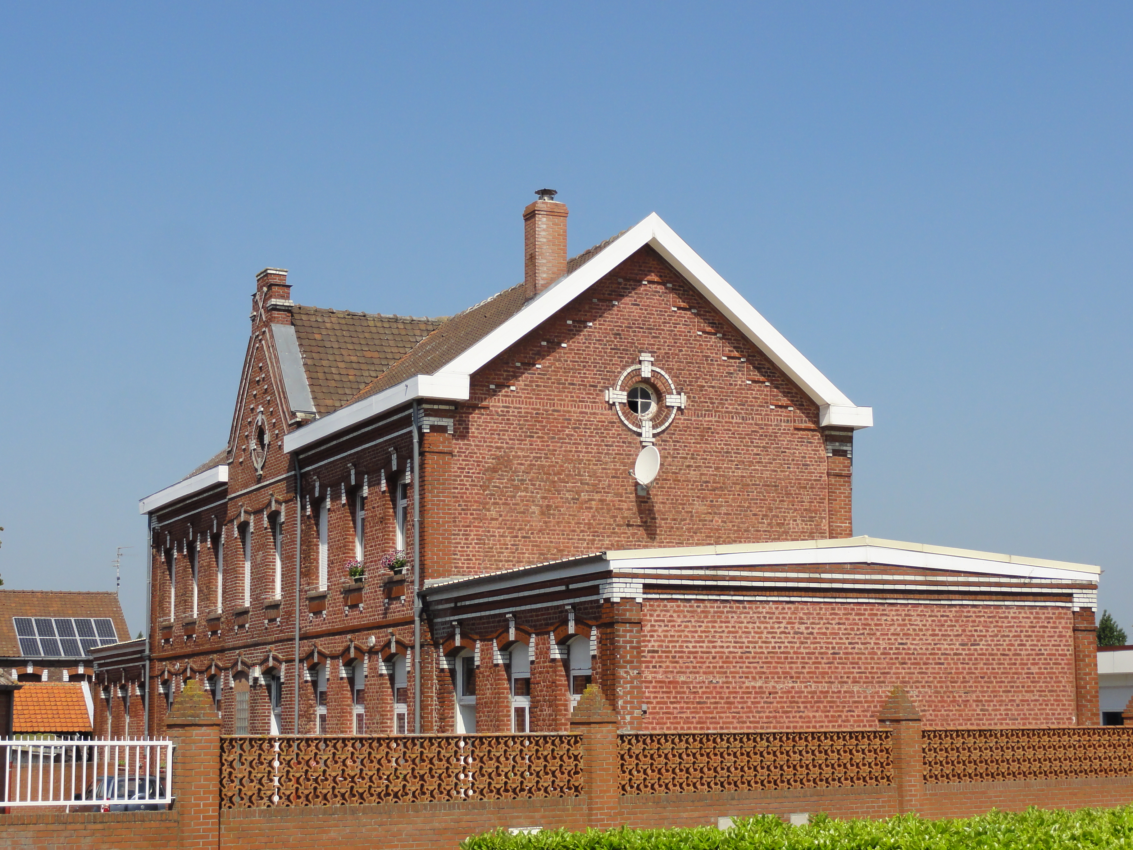 Cités de la Fosse n° 1 de la Compagnie des mines d'Azincourt, Monchecourt, Nord, Nord-Pas-de-Calais, France.